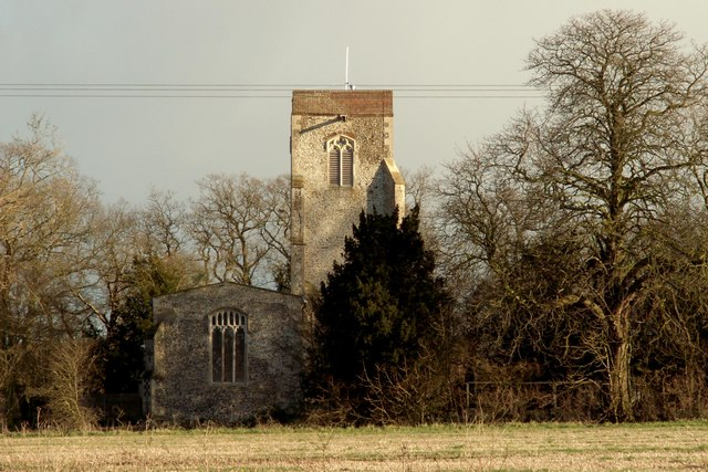 St. Andrew's church, Mickfield, Suffolk